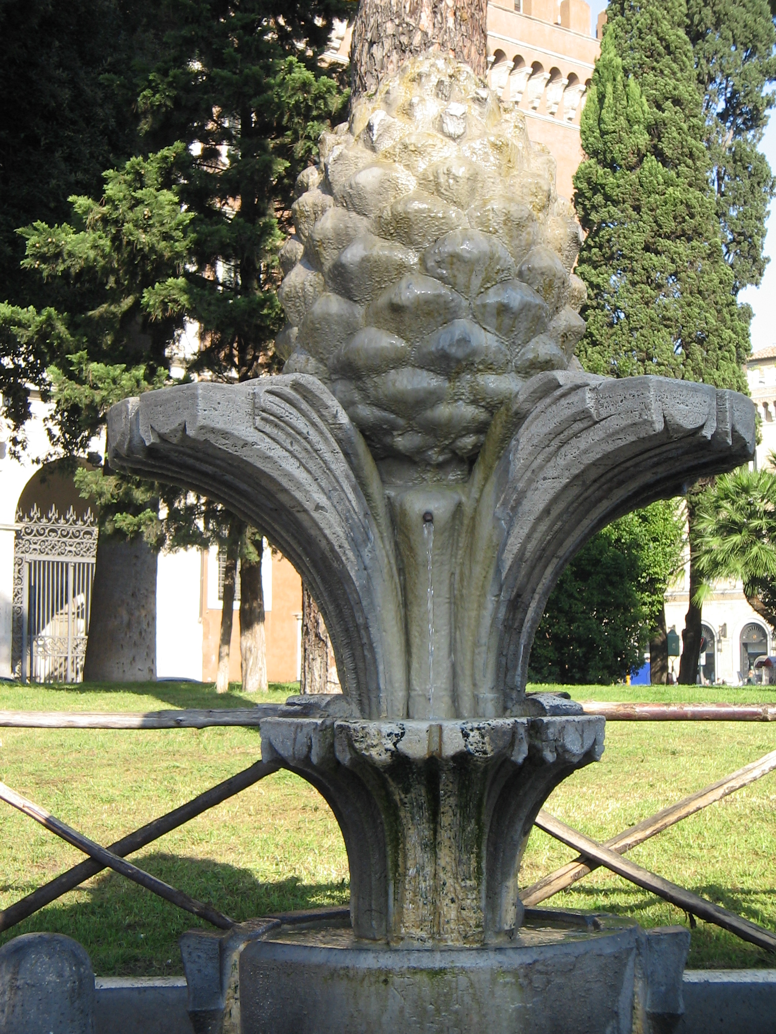 Fontana della Pigna Pietro Lombardi